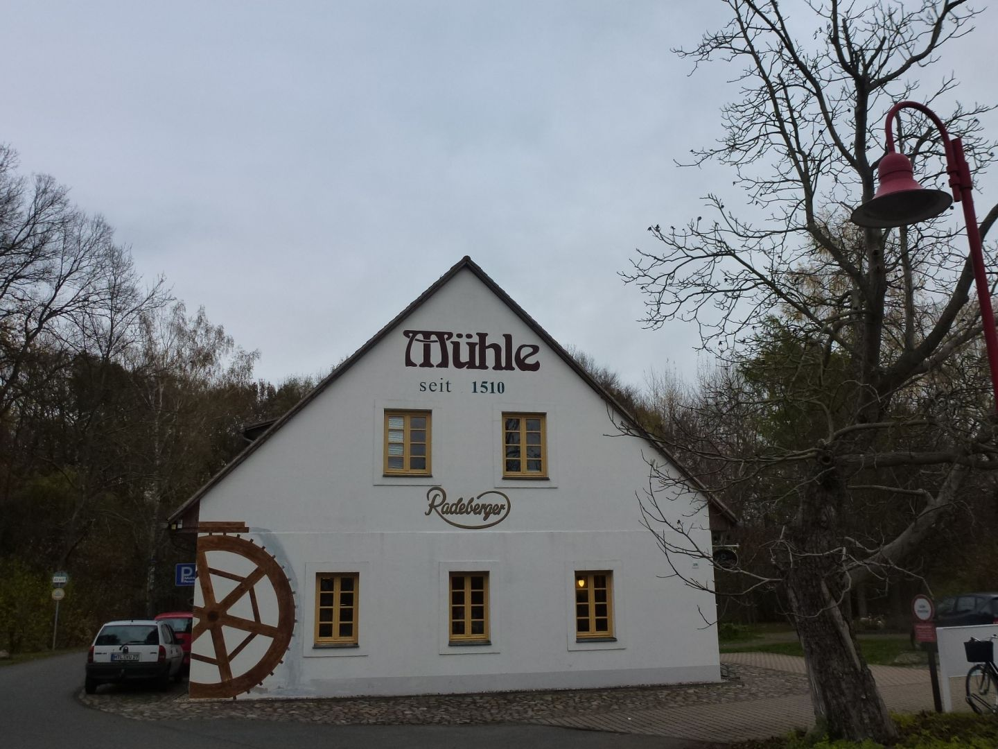 "Mühle" in Erdmannshain